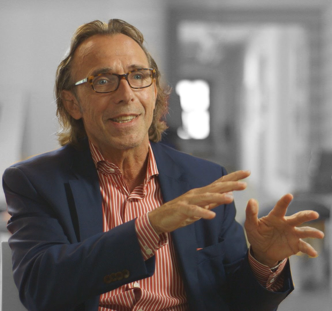 Zukunft - das ist für viele keine leuchtende Perspektive, sondern ein bedrohliches Donnergrollen. Werden Computer und Roboter das Leben der Menschen ...